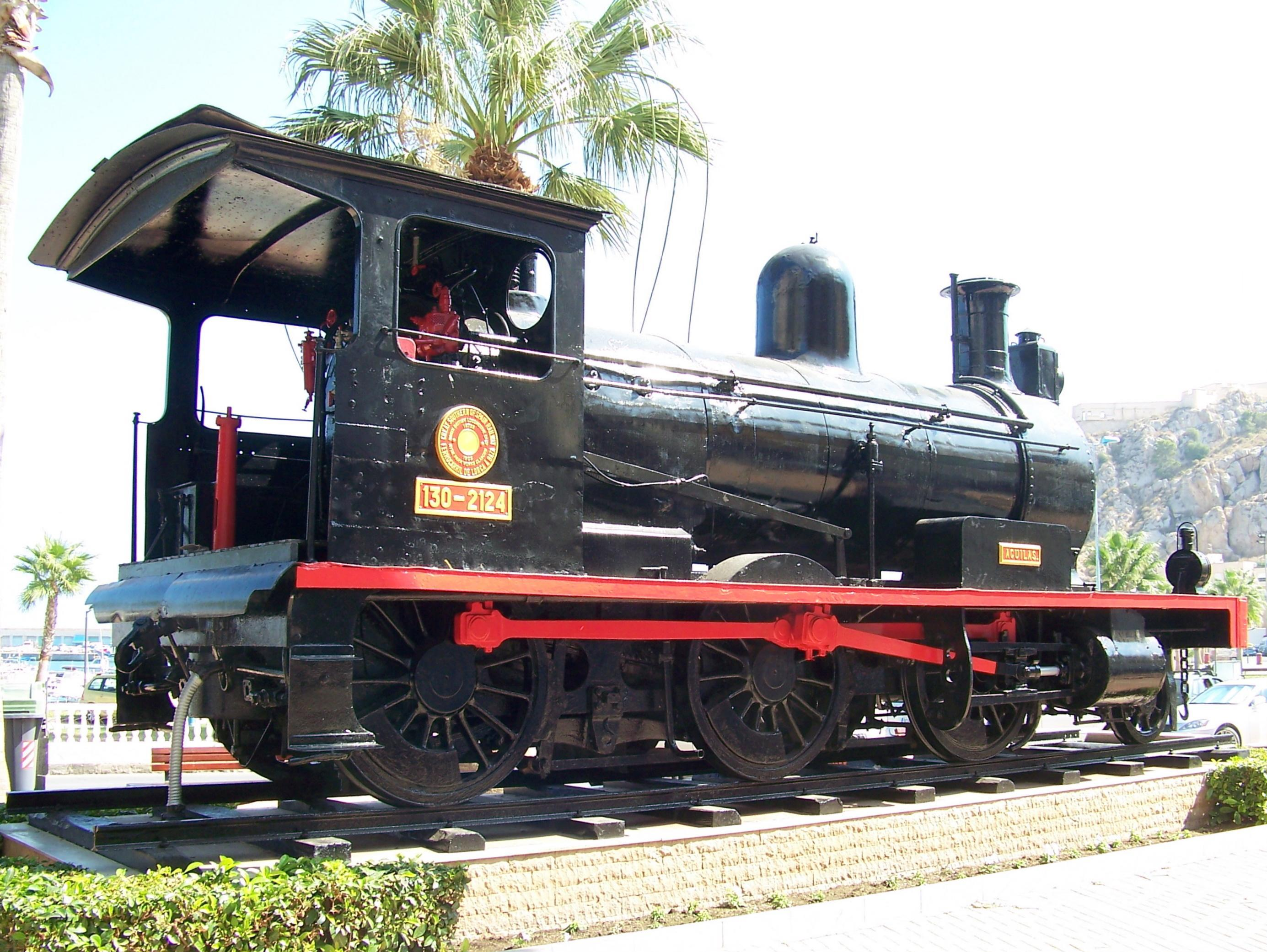 Locomotora 130-2124 de la GSSRL preservada en Águilas (Murcia, España)